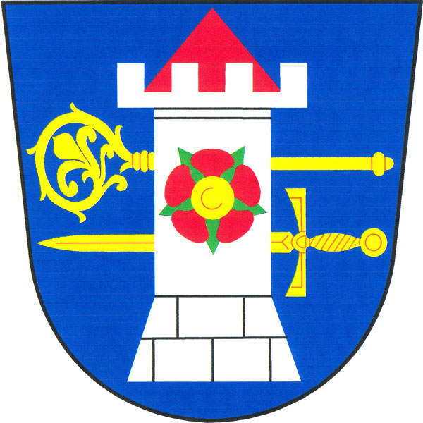 Znak obce Otovice (okres Náchod)